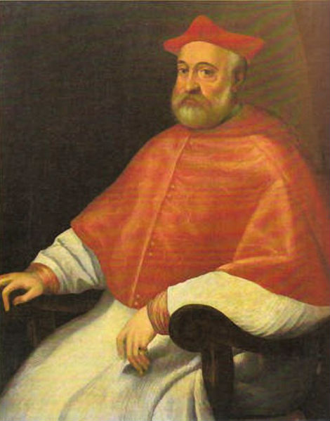 Ritratto di Ercole Gonzaga (1505-1563)